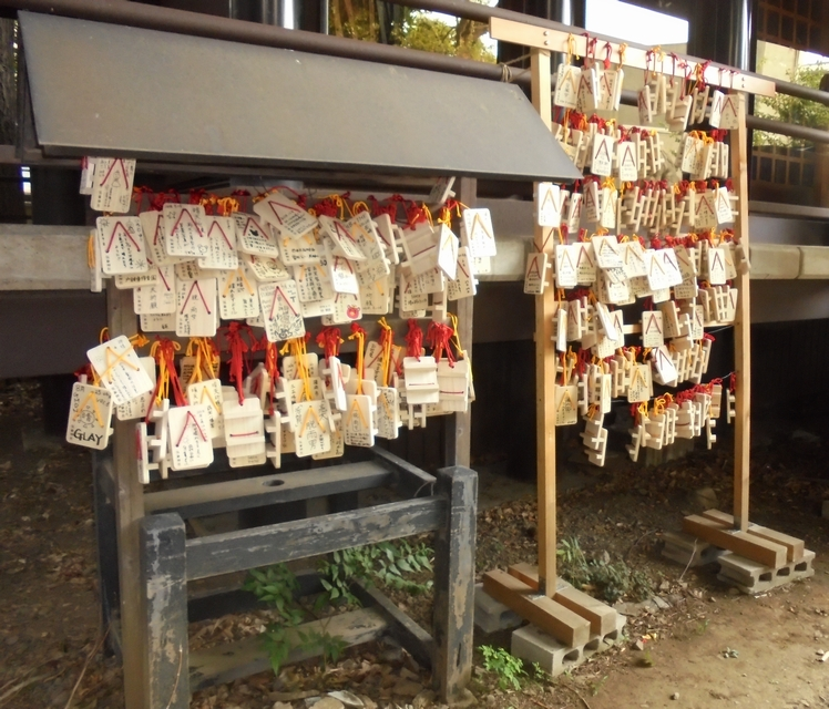 Geta Ema at Kishō Shrine (Hikawa Shrine), Kōenji, Tokyo, Japan.